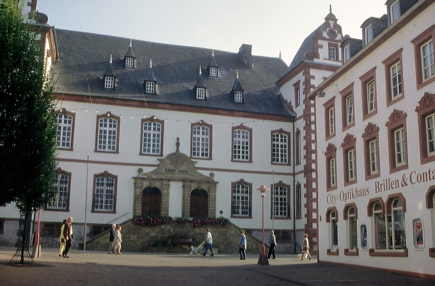 Rathaus Merzig (ehem. Jagdschloss)